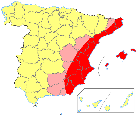 Map of Spanish levante.Mapa del levante español.